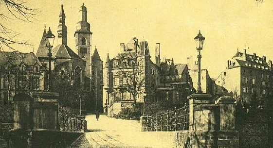 Le pont du Château dans la montée de Clausen avec l'église St Michel (à gauche) et la Villa Werling (au centre)